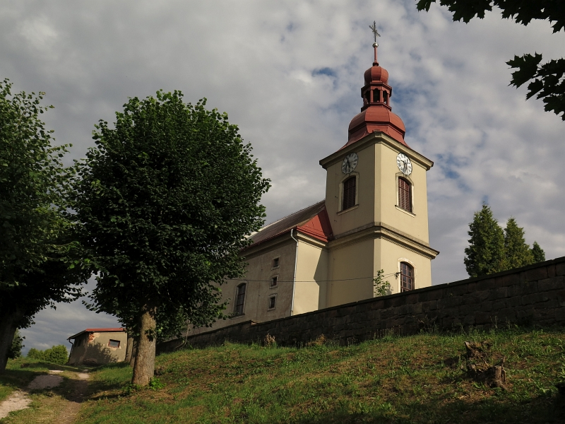 Kostel svatého Vavřince, Stará Paka.